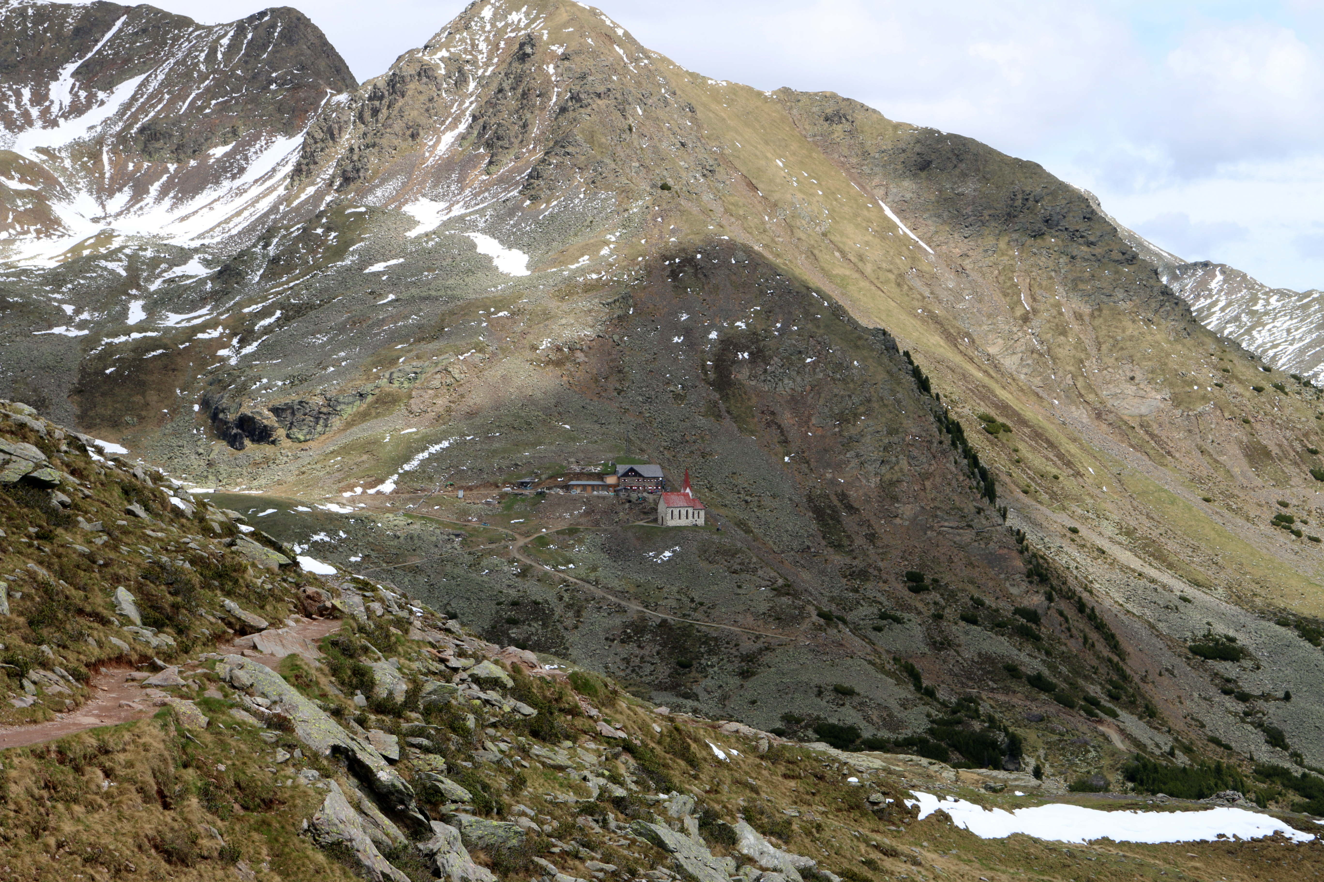 Klausen-Latzfons, Südtirol: Heiligkreuz auf Ritzlar und Schutzhaus Latzfonser Kreuz